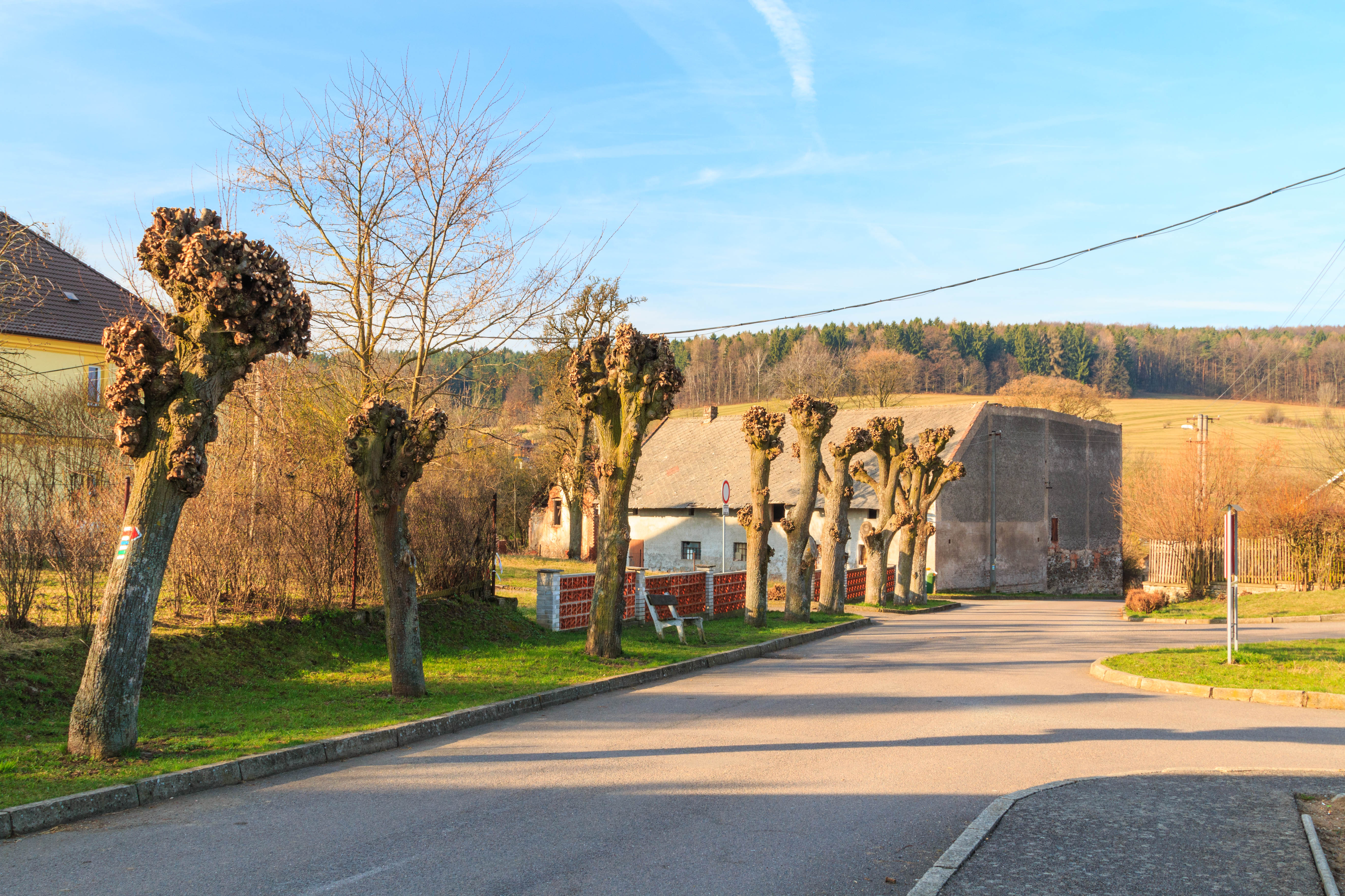 Vápenný Podol - dům čp. 39